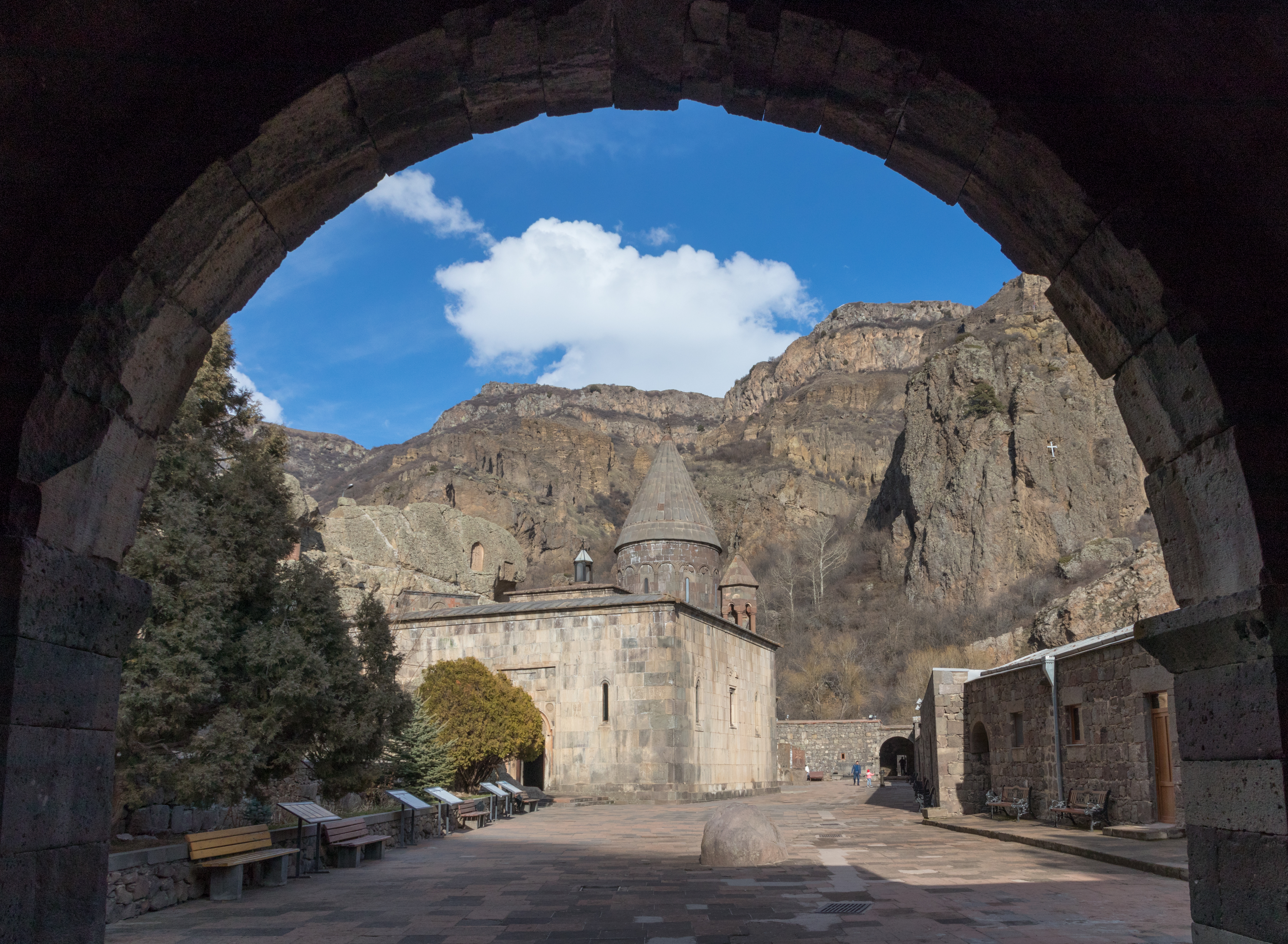 Geghard